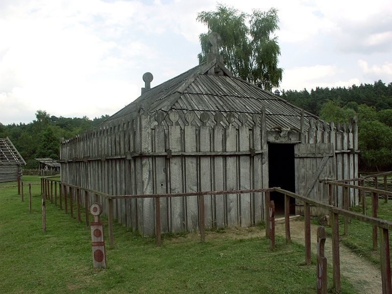 Tempel